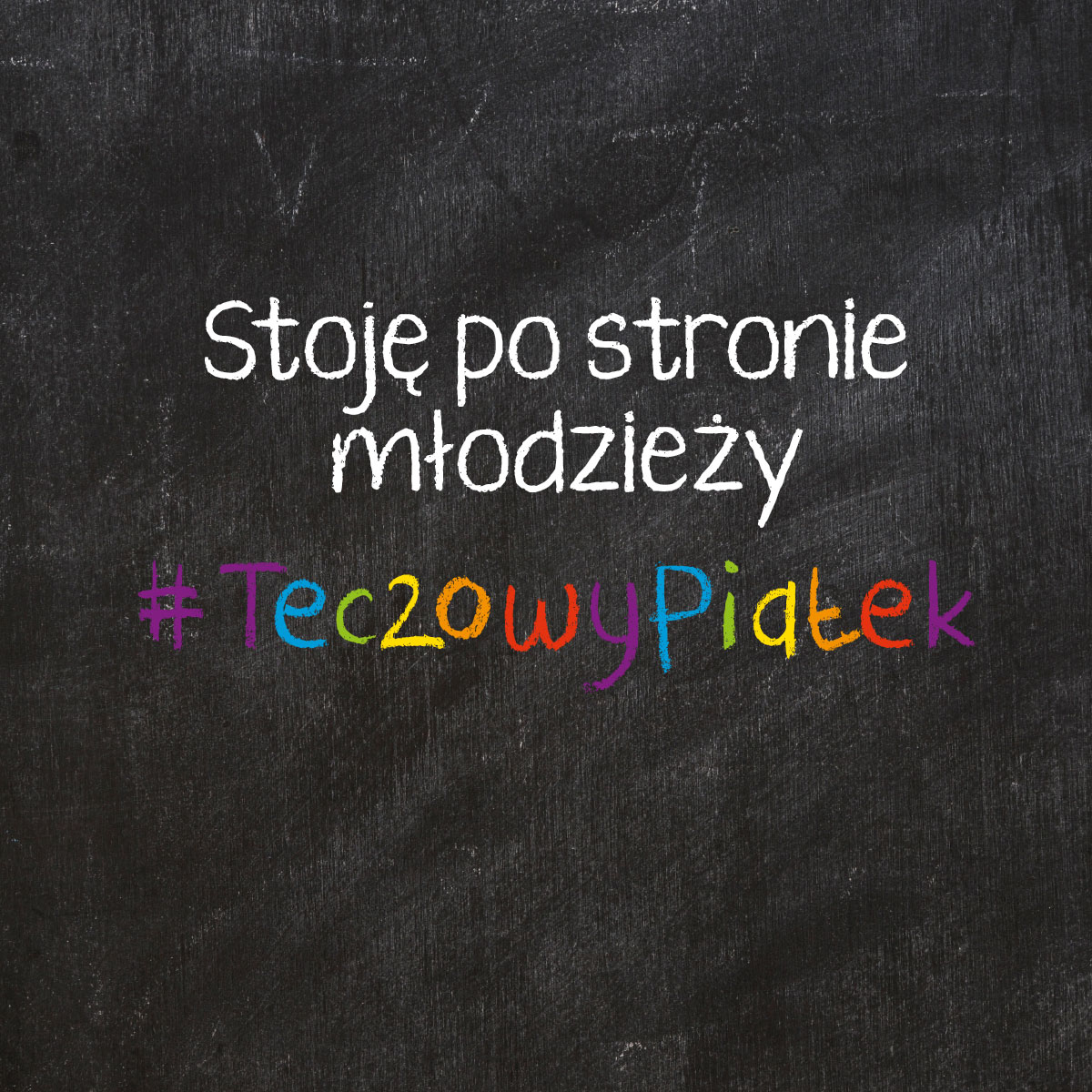 Tęczowy Piątek - plakat "stoję po stronie młodzieży"